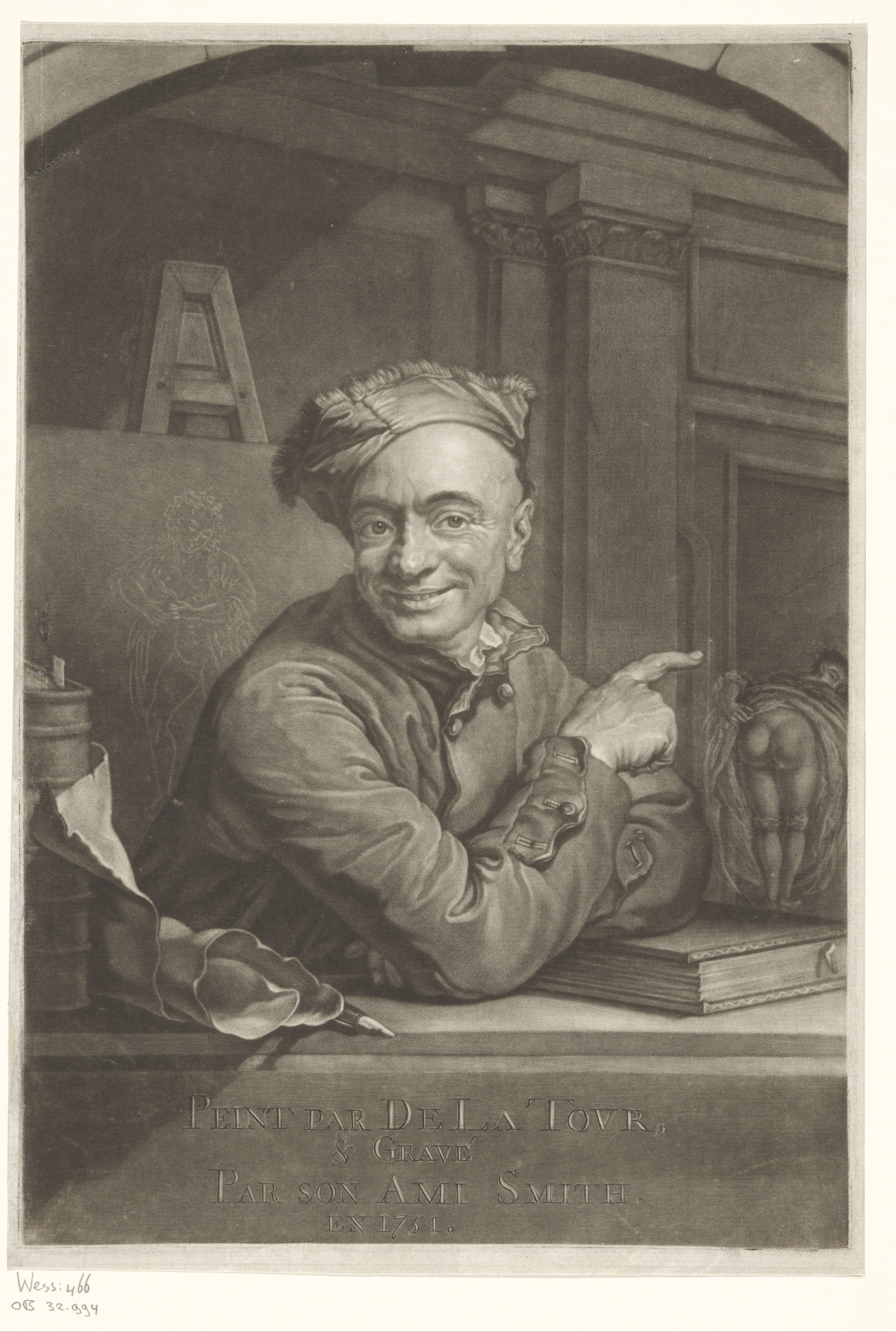 IdentificatieTitel(s): Maurice Quentin de La TourObjecttype: prent Objectnummer: RP-P-OB-32.994VervaardigingVervaardiger: prentmaker: John Smith (prentmaker/ uitgever)naar schilderij van: Maurice-Quentin de La TourDatering: 1662 - 1742Fysieke kenmerken: mezzotintMateriaal: papier Techniek: mezzotintVerwerving en rechtenVerwerving: overdracht van beheer 1816Copyright: Publiek domein